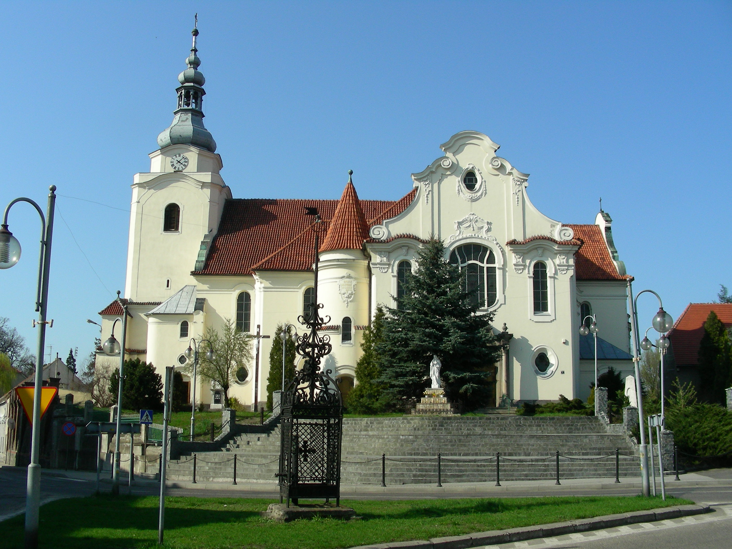 Kościół Trójcy Świętej w Korfantowie, Korfantów, powiat nyski, województwo opolskie